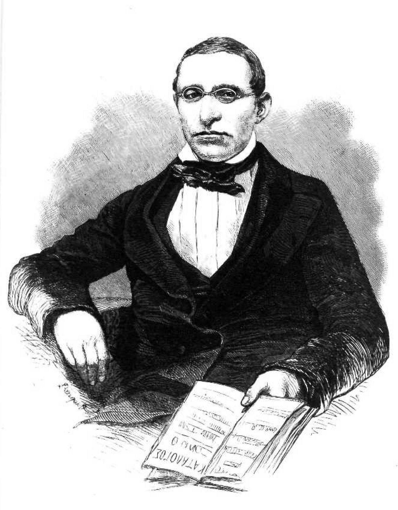 Griechischer Literat und Herausgeber, 19. Jahrhundert